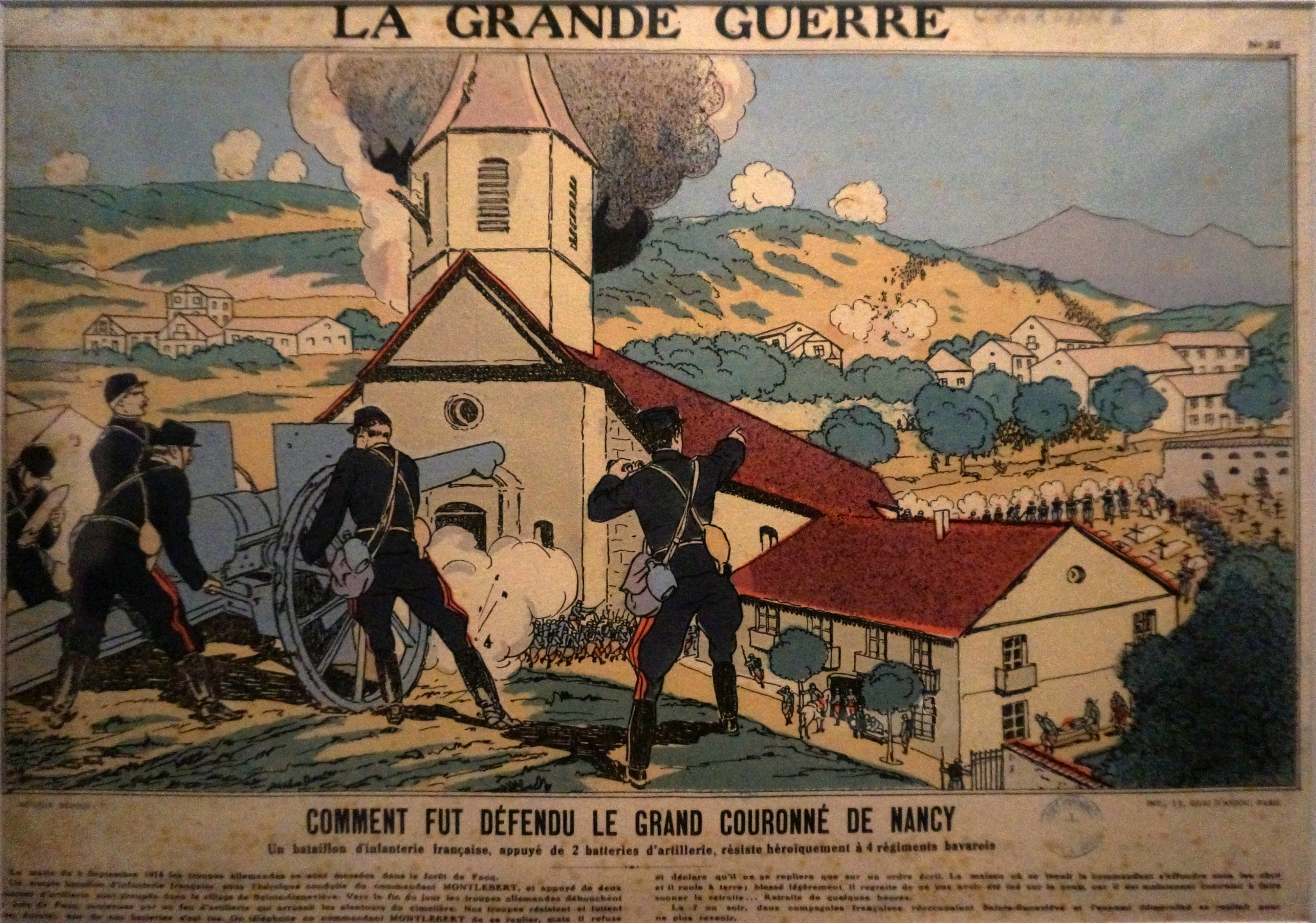 Lors de l'exposition Été 1914 Nancy et la Lorraine dans la guerre.